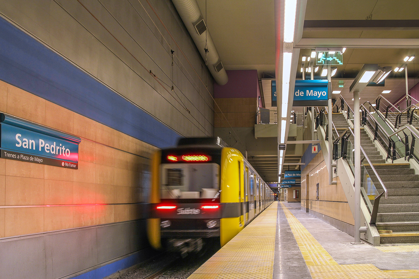 Terminal de la línea A de subtes